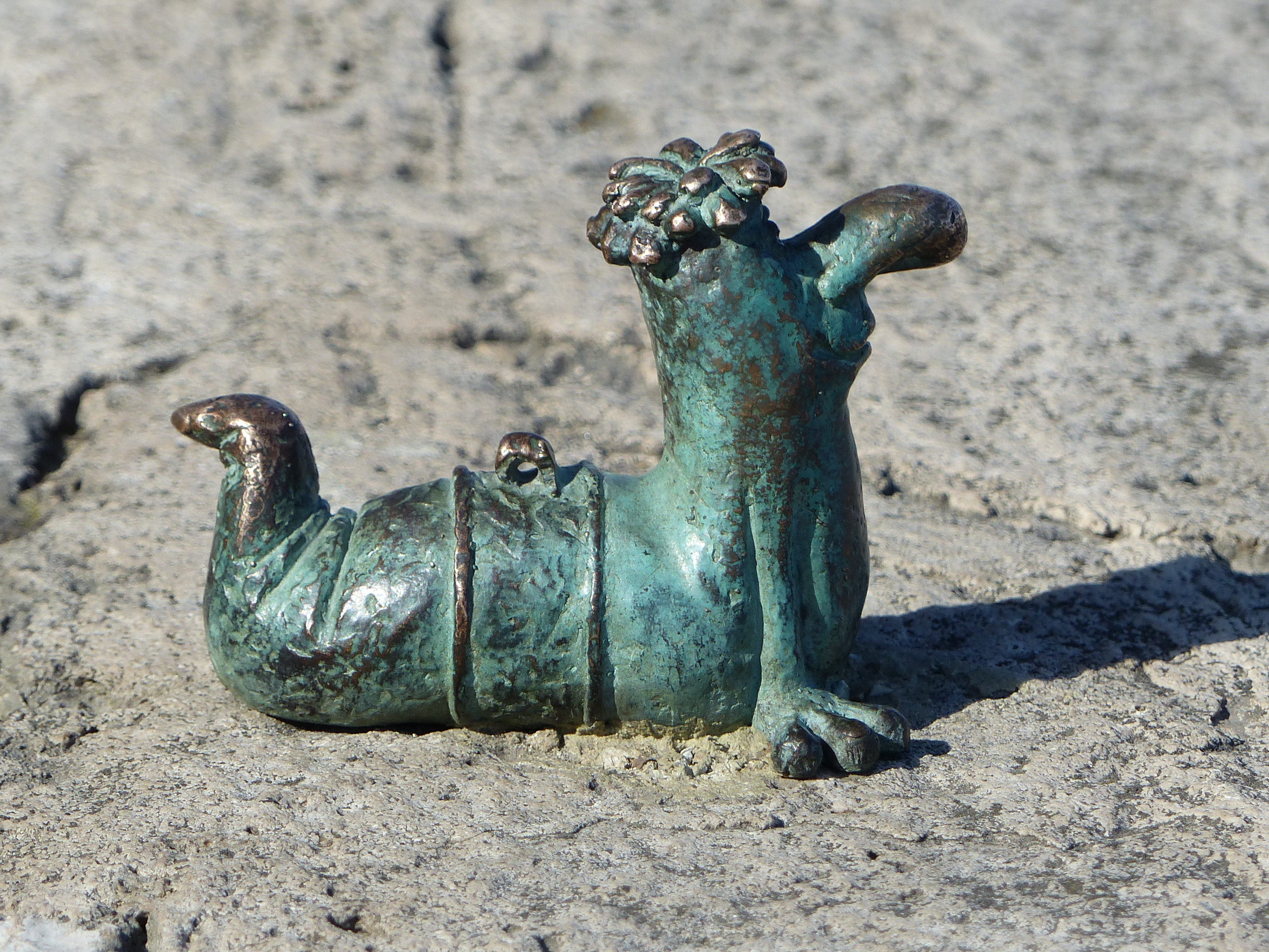 Főkukac. A felvétel 2017. március 27-én hétfőn készült a Bem rakparton, a Halász utcai lejárónál. Sajdik Ferenc rajzfilmfigurája a nagy ho-ho horgász című rajfilmből. A 15 cm-es bronz szobrot Mihajlo Kolodko ukrán szobrász készítette. 2016 november 29-én késő este helyezték el a kis szobrot korábban az Ung partján, Ungváron, a Filharmónia közelében.